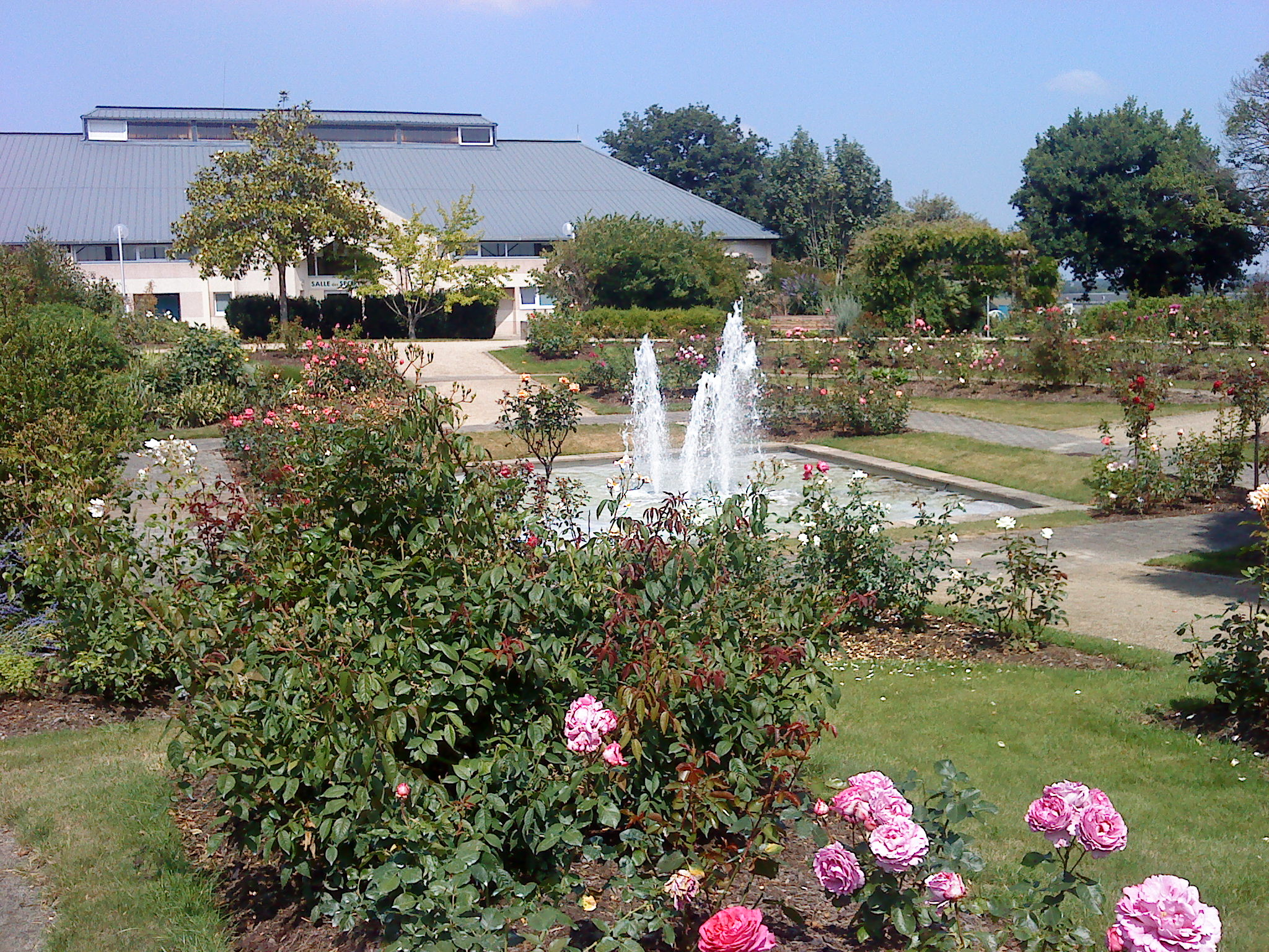 Courtil des senteurs à Quévert